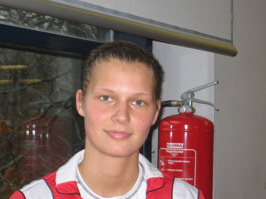 Jennifer Werth